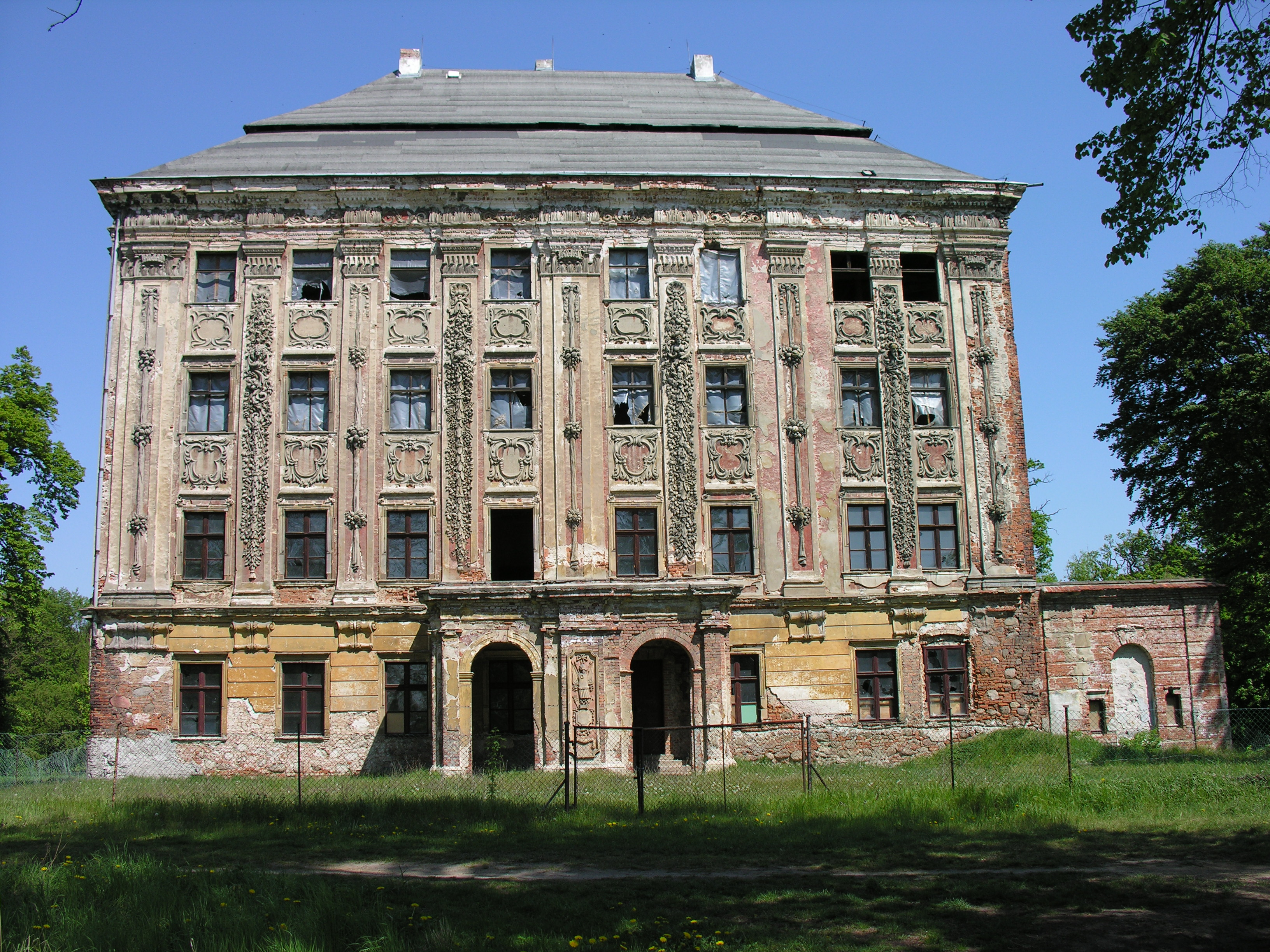 Piotrkowice - pałac (zabytek nr A/3926/1039 z dn. 1964-01-23)